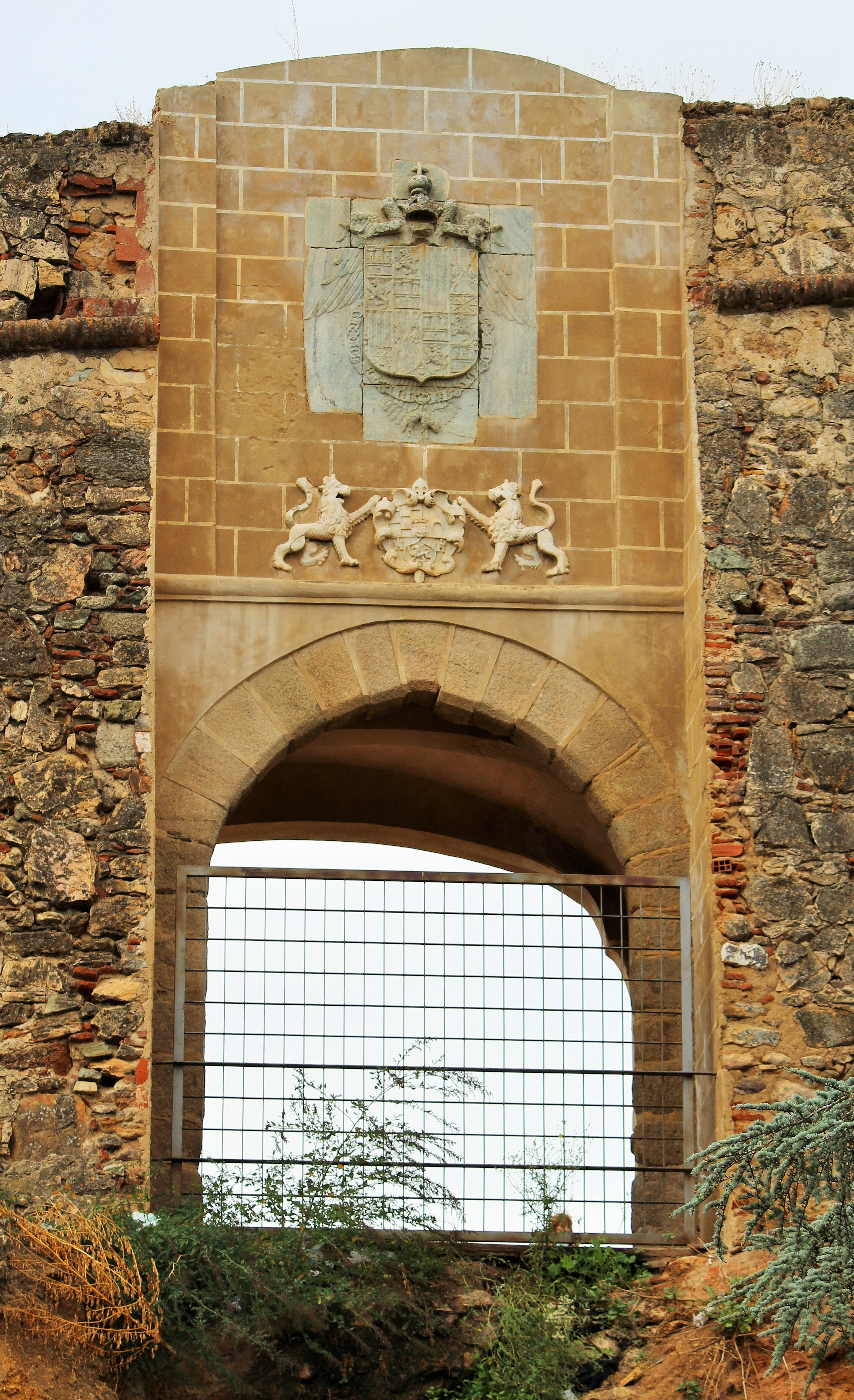 Fachada exterior al este.